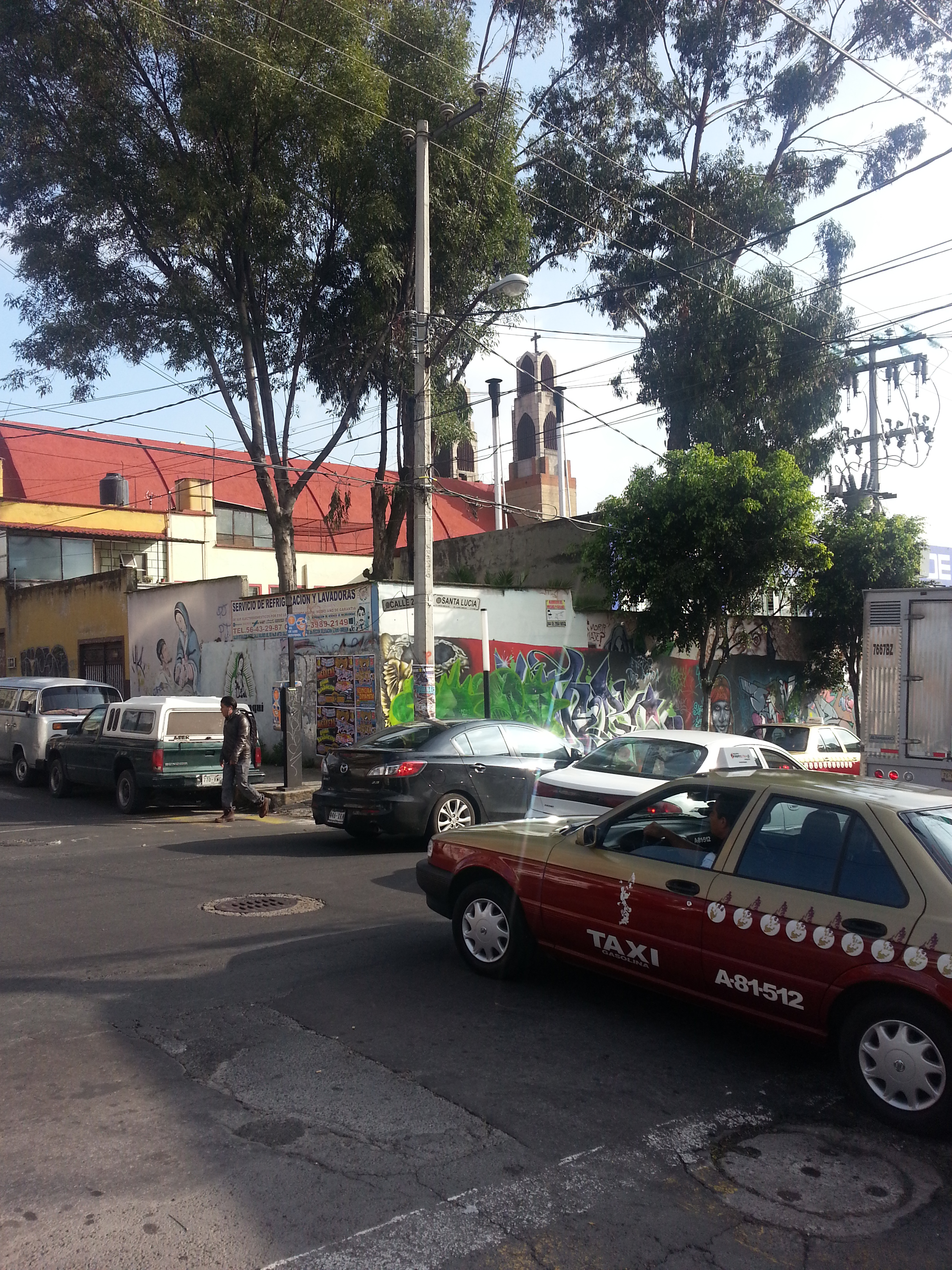 la imagen muestra una calle en la Colonia Olivar del Conde en la actualidad